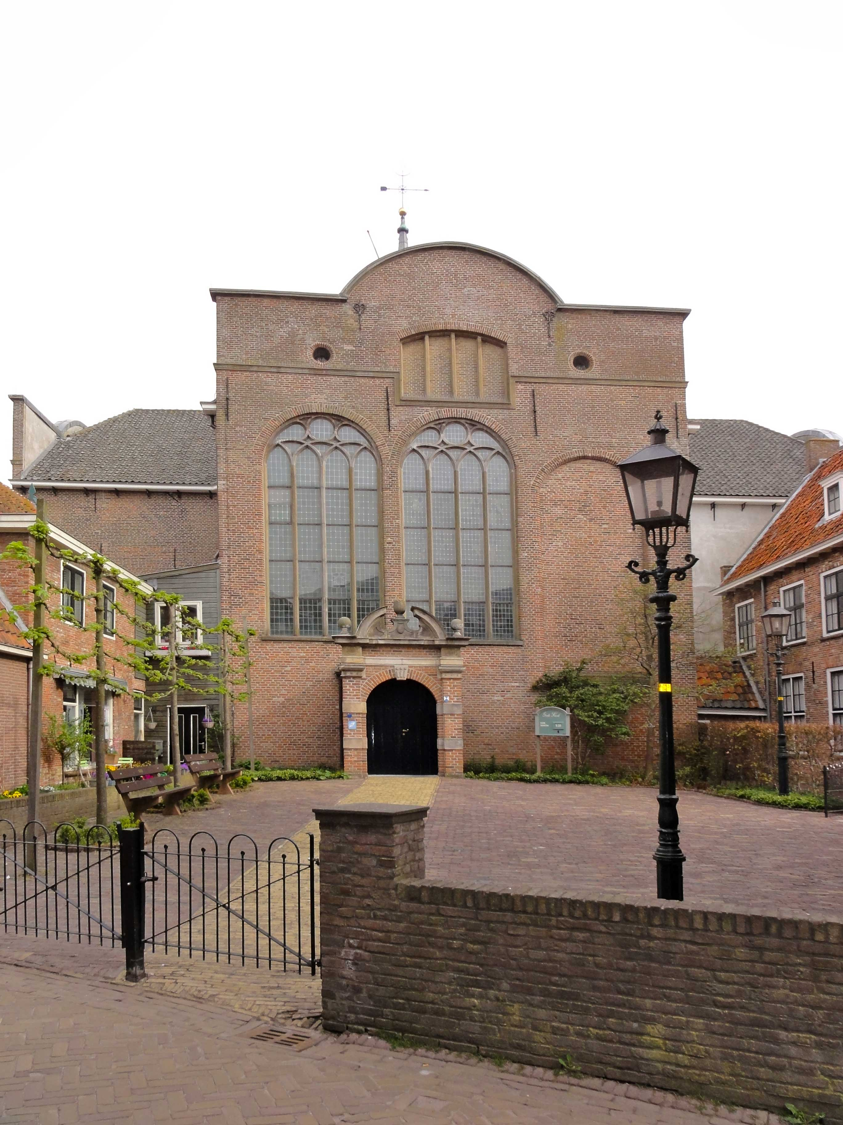 Brouwerstraat 11 "Grote Kerk" Blokzijl (rijksmonument)